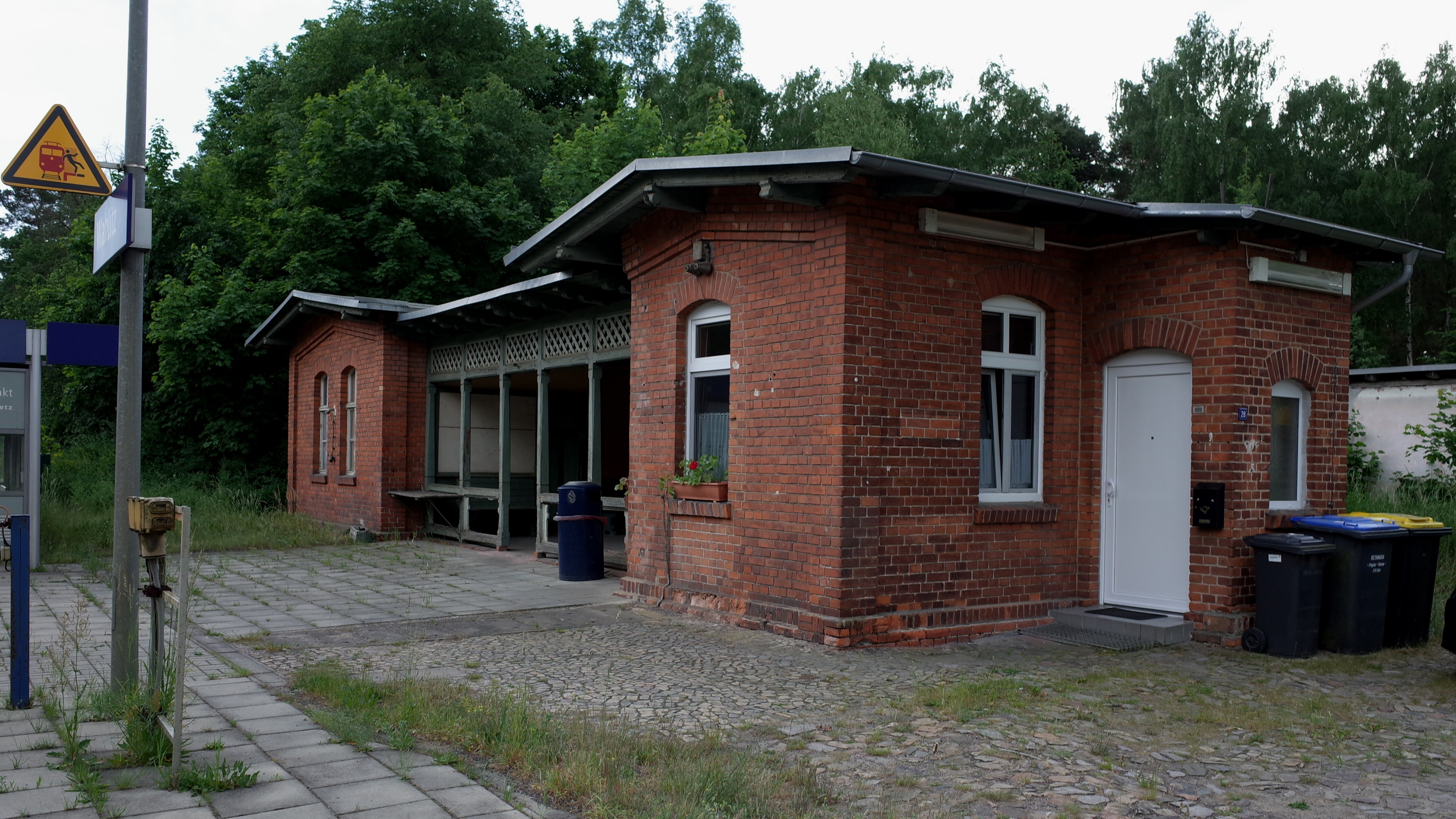 Wahlitz, Bahnhof